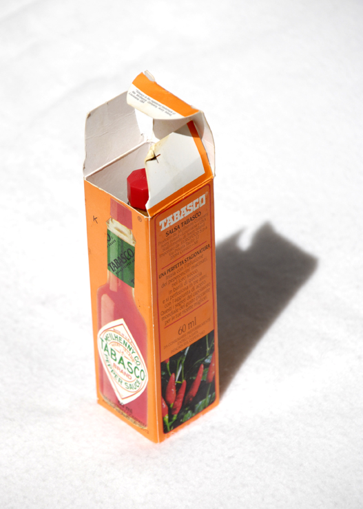 Tabasco pepper sauce. Box.